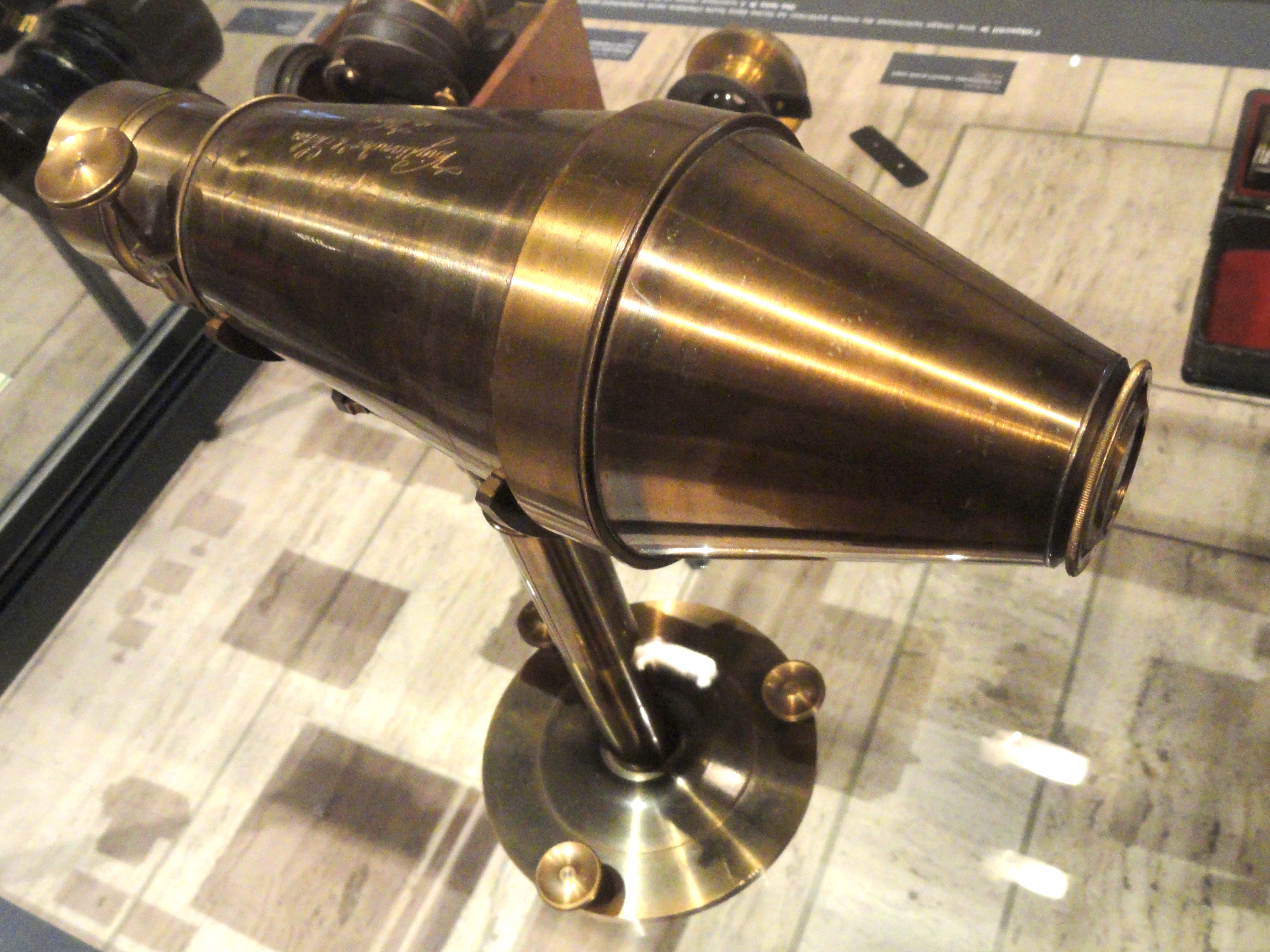 Voigtländer Petzval objective, an 1840 portrait lens reproduced in 1940. Exhibit in the Musée Nicéphore Niépce, 28 Quai Messageries, Saône-et-Loire, France. There were no restrictions on photography in the museum.